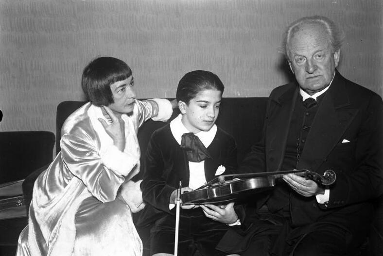 Der 11 jährige Wundergeiger Ruggiero Ricci, spielt zum erstenmal vor einem grossen Publikum in der Philharmonie in Berlin ! Der deutsche Dichter Gerhard Hauptmann und Gattin mit dem kleinen Wundergeiger.